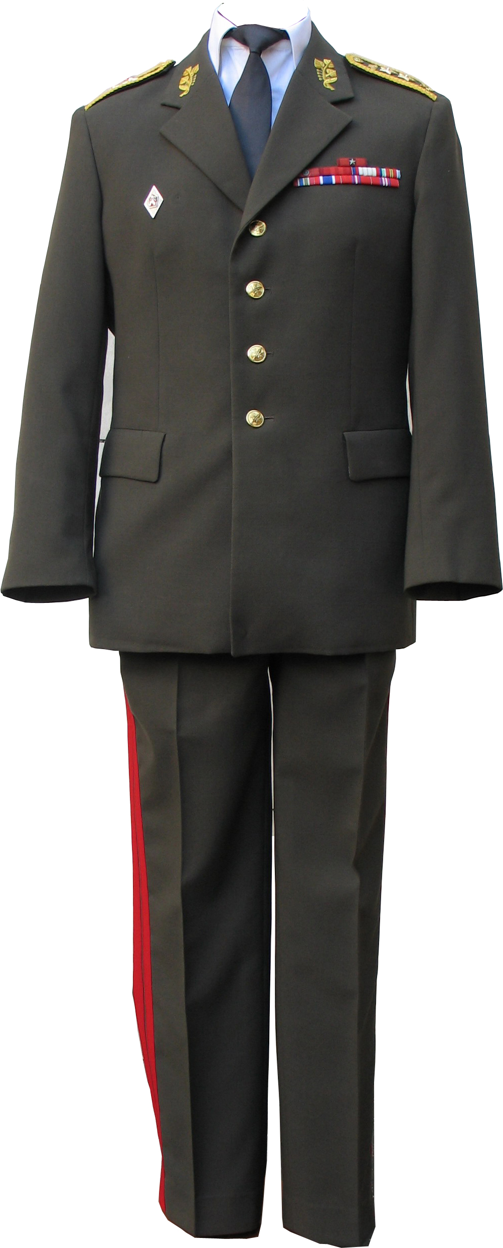 Generálska rovnošata príslušníka ČSĽA